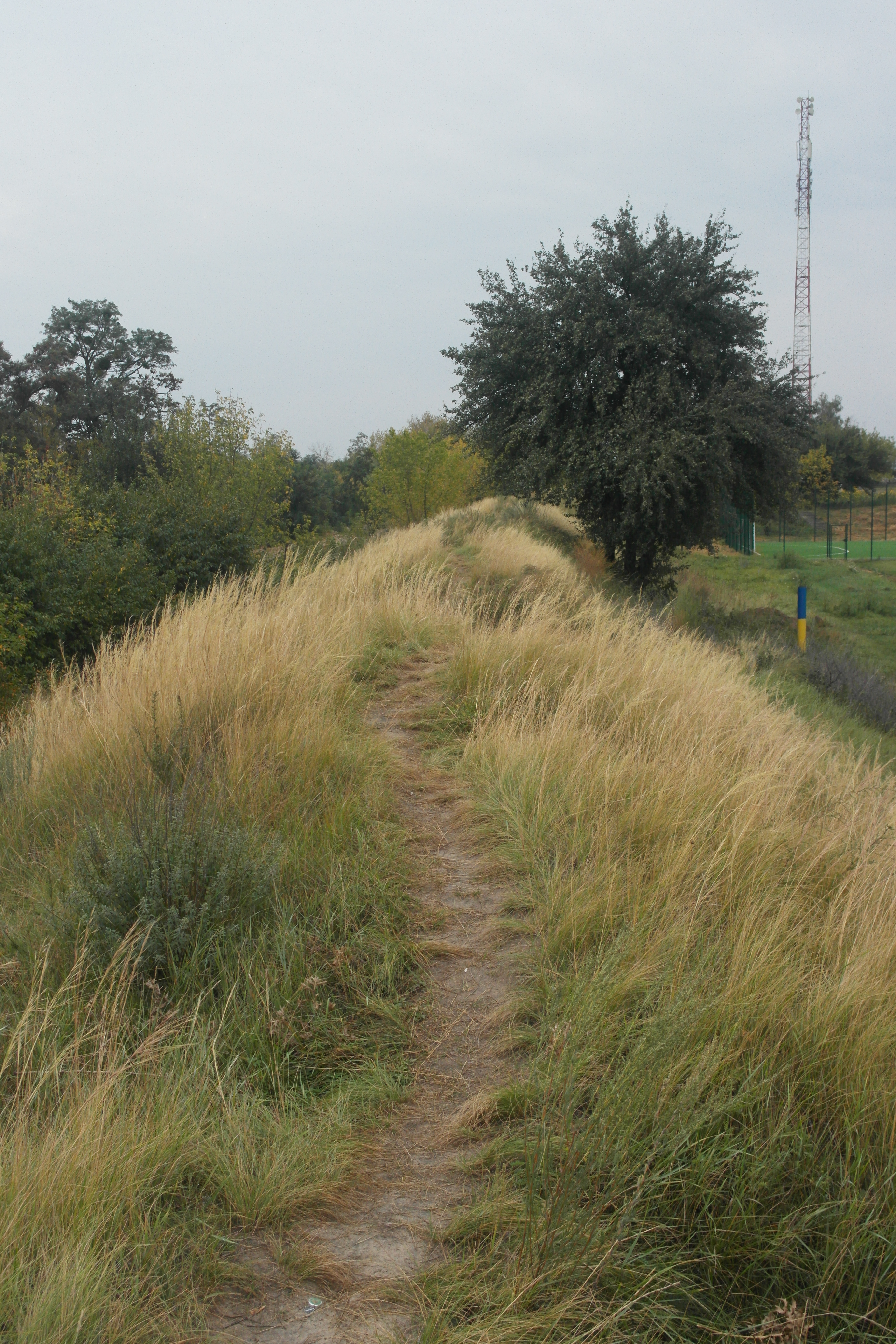 Городище літописного міста Білгорода і могильник, Білогородка